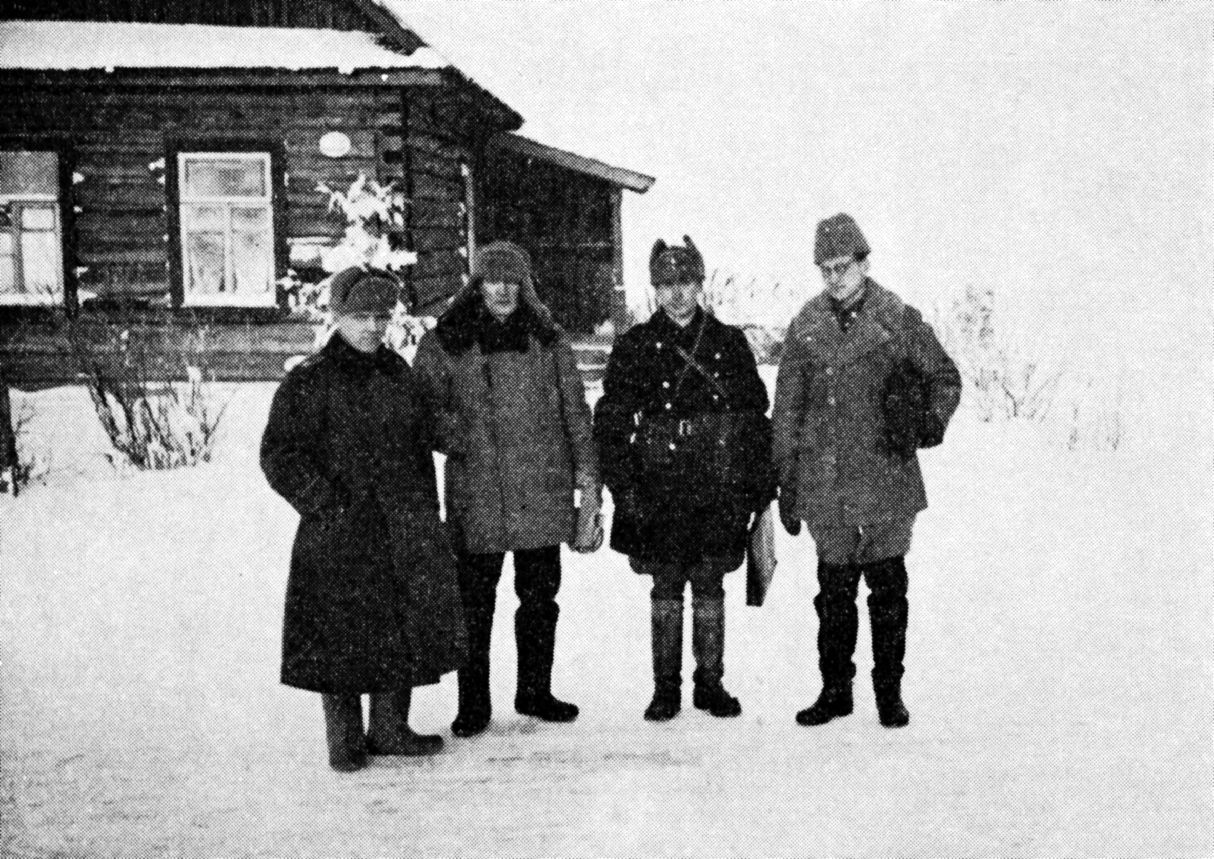 Инспекционная комиссия в Ингерманландии. 1942 год. Красное Село. Слева направо: капитан Юкка Тирранен, бывший председатель Временного комитета Северной Ингерманландии (1920), школьный советник Лаури Пелконен, представитель полиции Каарло Стендаль, пастор Юхани Яскелайнен